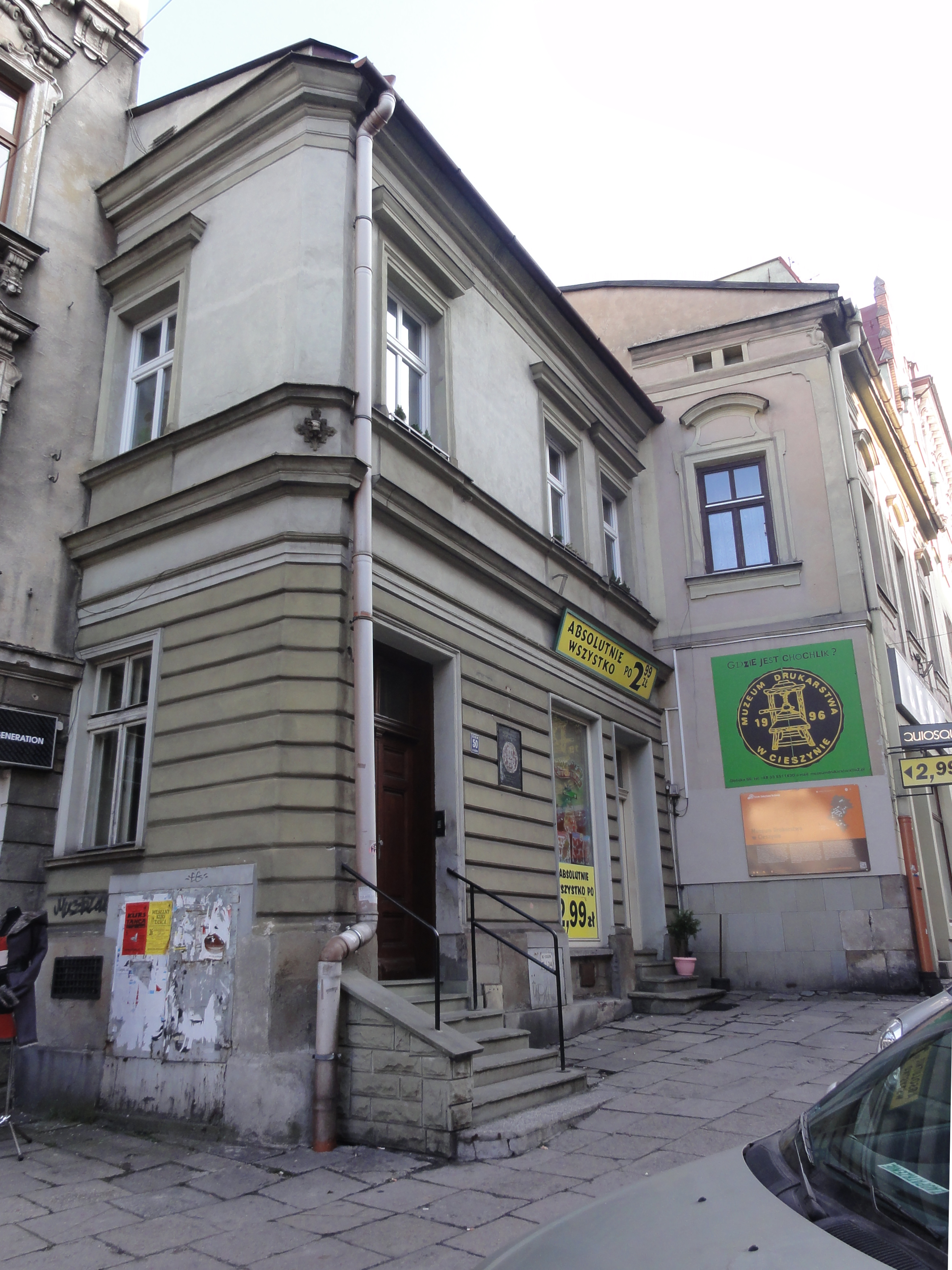 Cieszyn, Głęboka 50 - Muzeum Drukarstwa